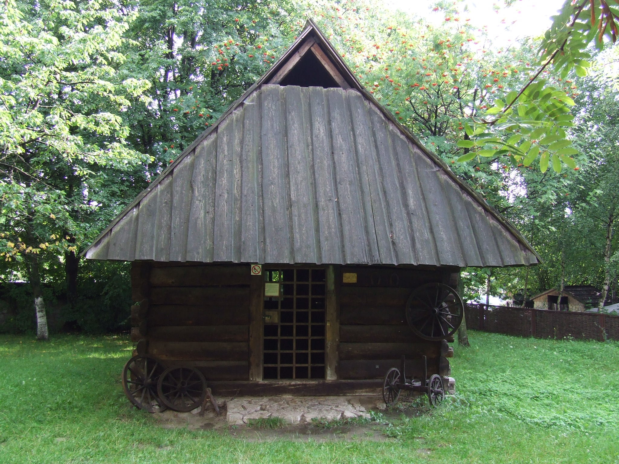 Wygiełzów - skansen, kuźnia z Liszek z XIX w.